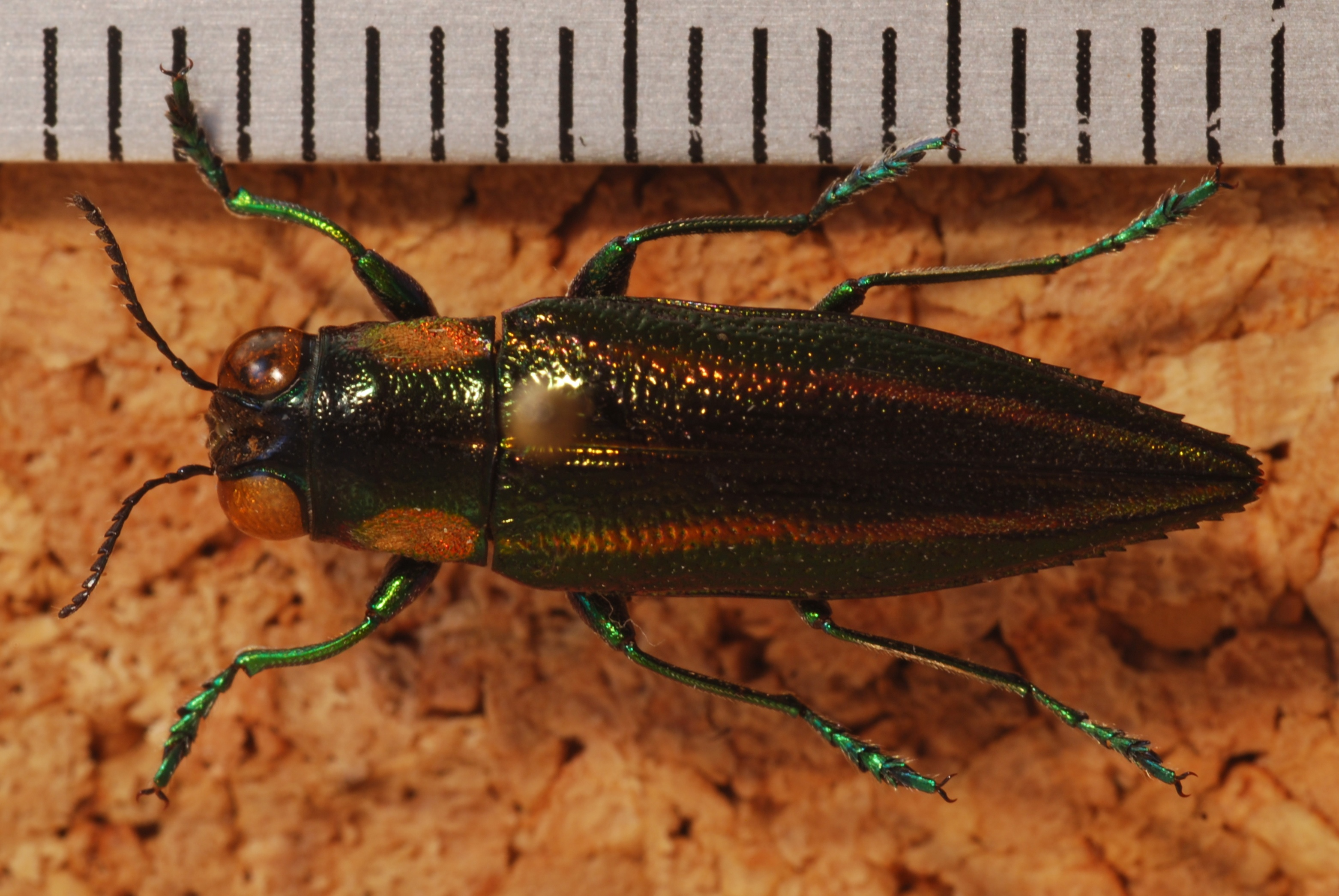 Payakumbuh, Harau Valley, West Sumatra, INDONESIA